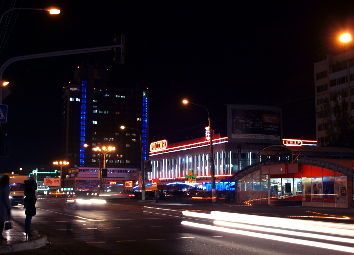 Нічне місто: Вулиця Оборонна (Луганськ)